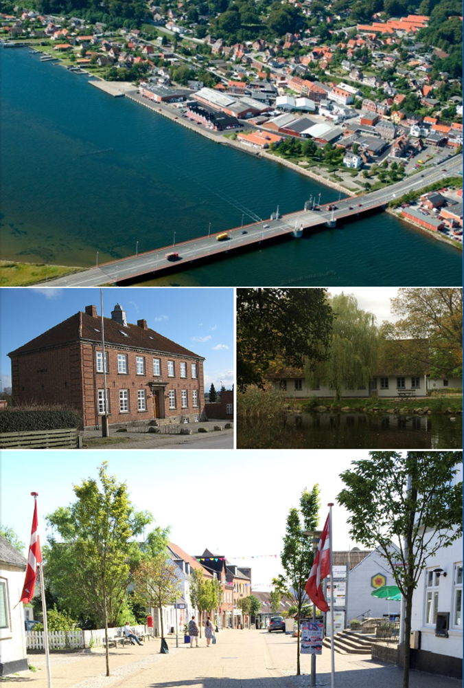 Collage fra Hadsund. Fra venstre hjørne: Udsigt over Hadsunds havne område og dele af midtbyen, den historiske gamle politigård, Byens museum set fra Rosendalssøen og byens gågade Storegade.